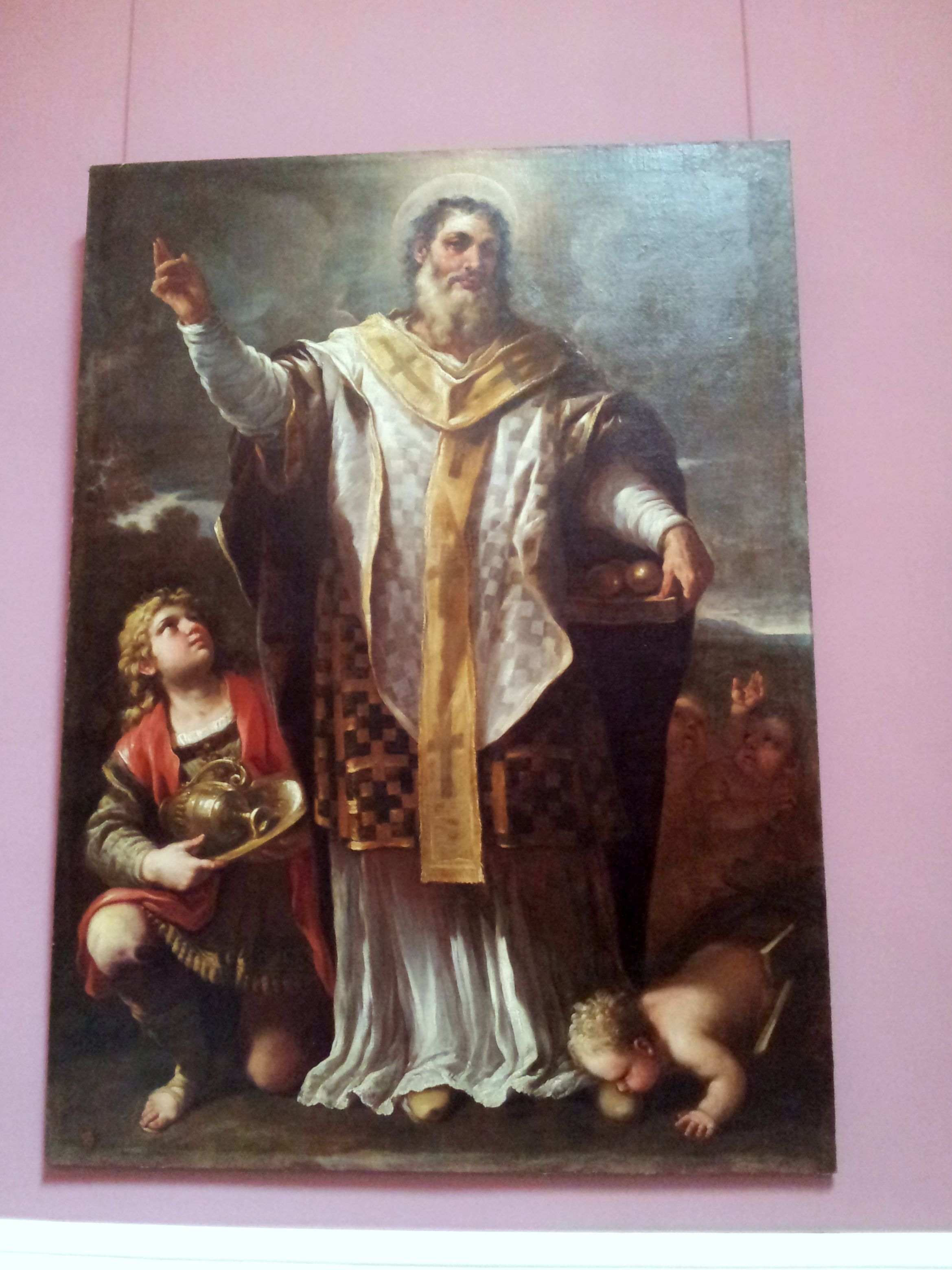 Chiesa dei Girolamini (Napoli) - Passeggetto con alcune tele che conduce alla Sacrestia. La tela inquadrata è di Luca Giordano: San Nicola da Bari salva tre fanciulli da un tino.